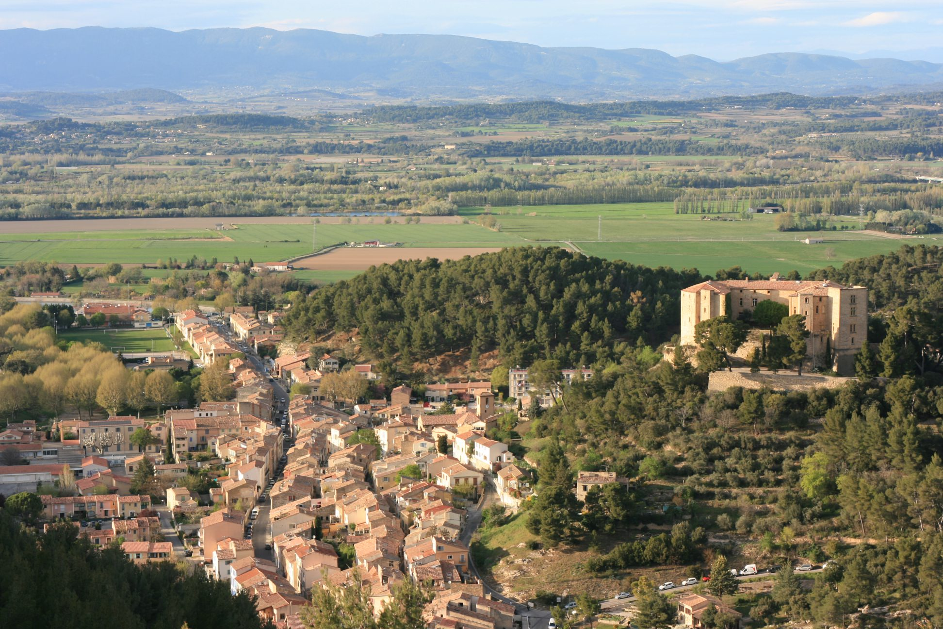 Vue d'une partie de la commune de Meyrargues et son château depuis le sud. Au fond, la plaine de la Durance et le Lubéron en arrière-plan.